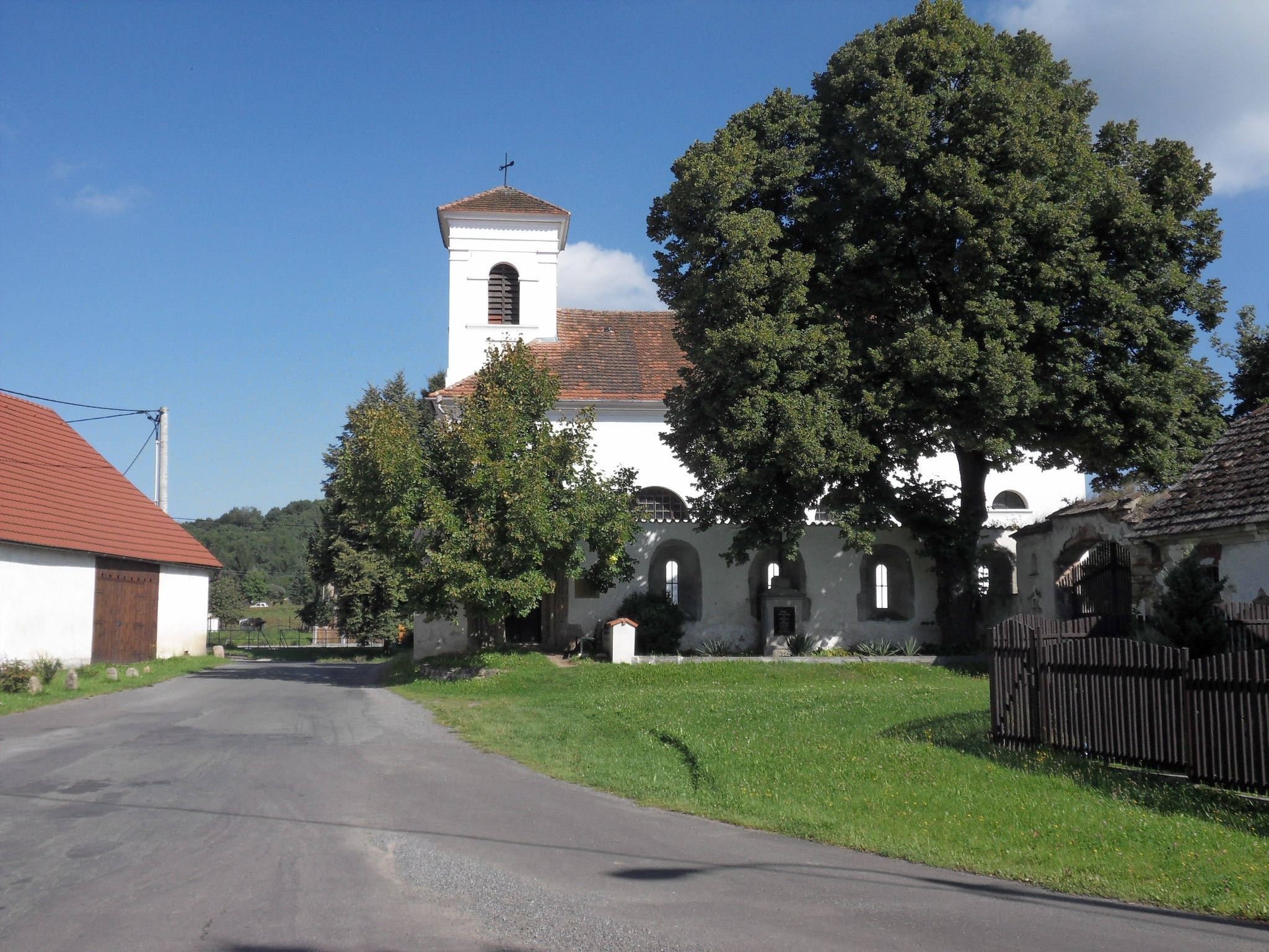 Kaple sv. Markéty v obci Klášter u Nepomuka, okr.Plzeň-jih